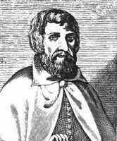 Arnaldus de Villanova